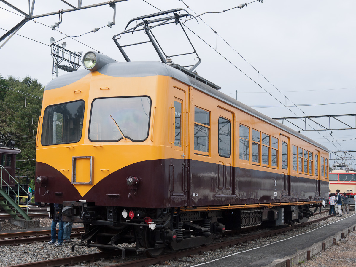 西武鉄道モハ505（クモハ355）、横瀬車両基地の保存車。